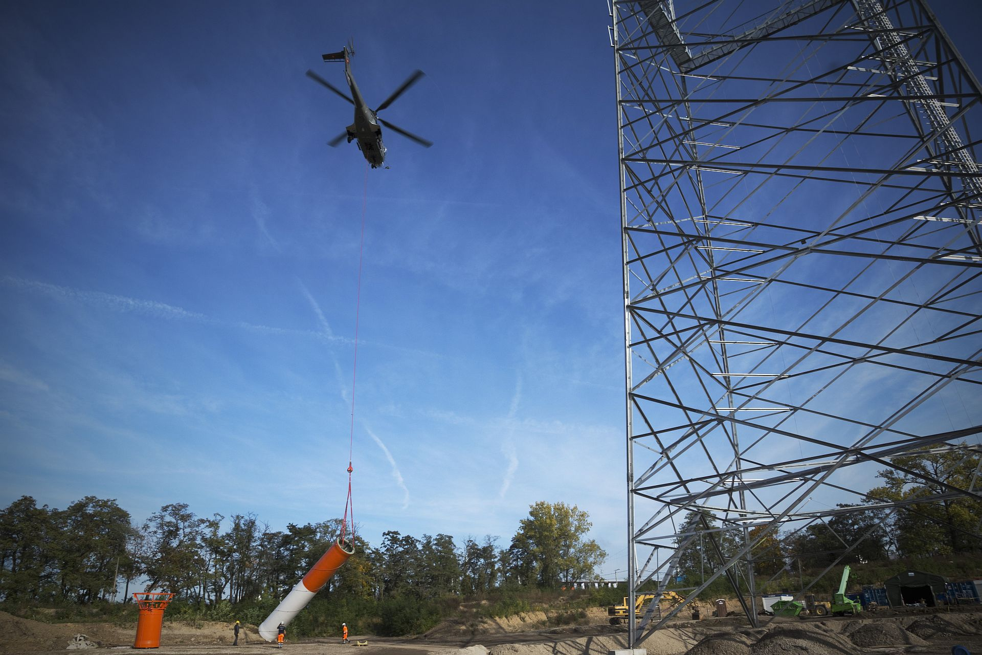 Lastenhubschrauber "Super Puma" bei der Arbeit